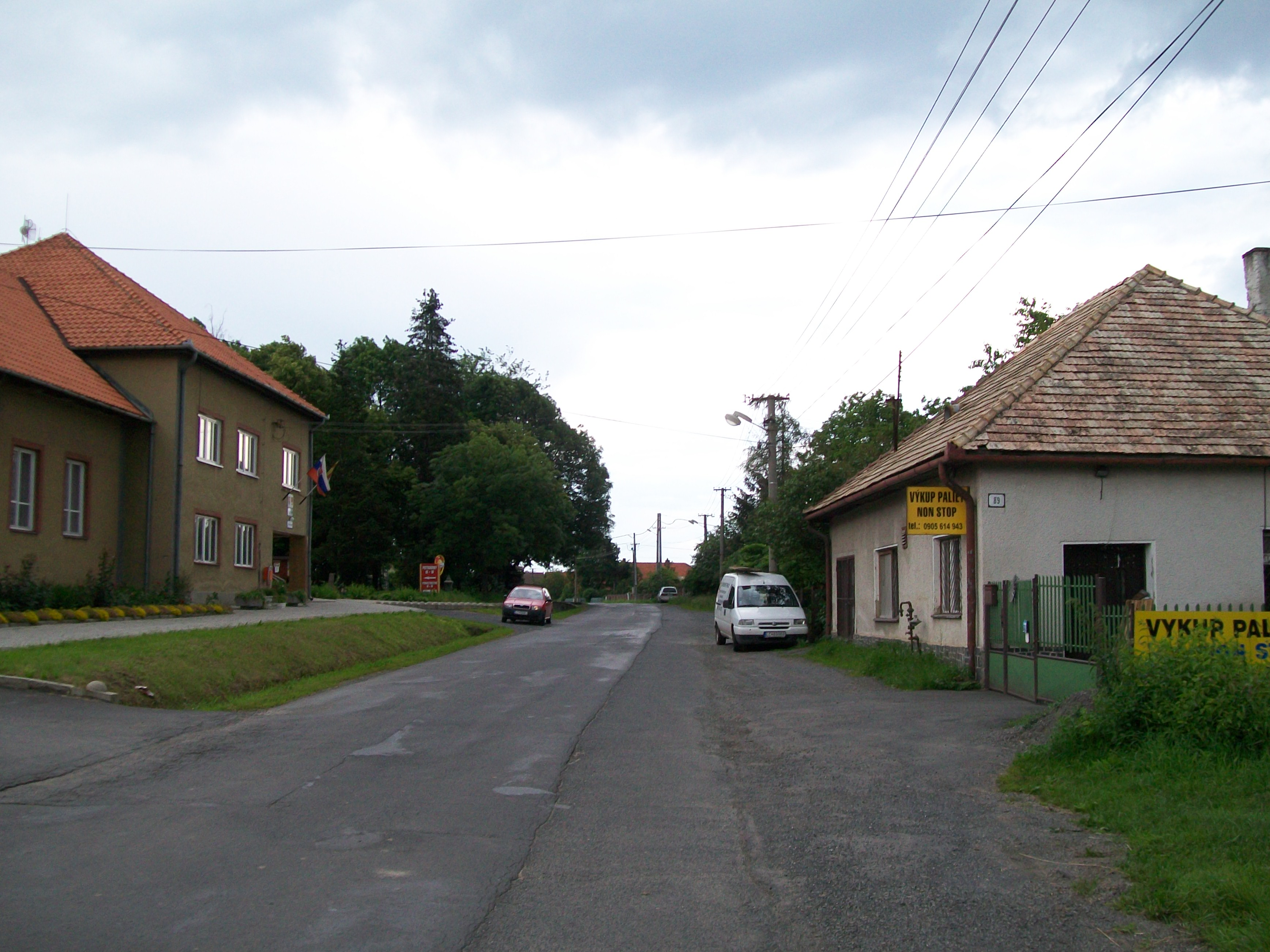 Ulica obce Buzitka